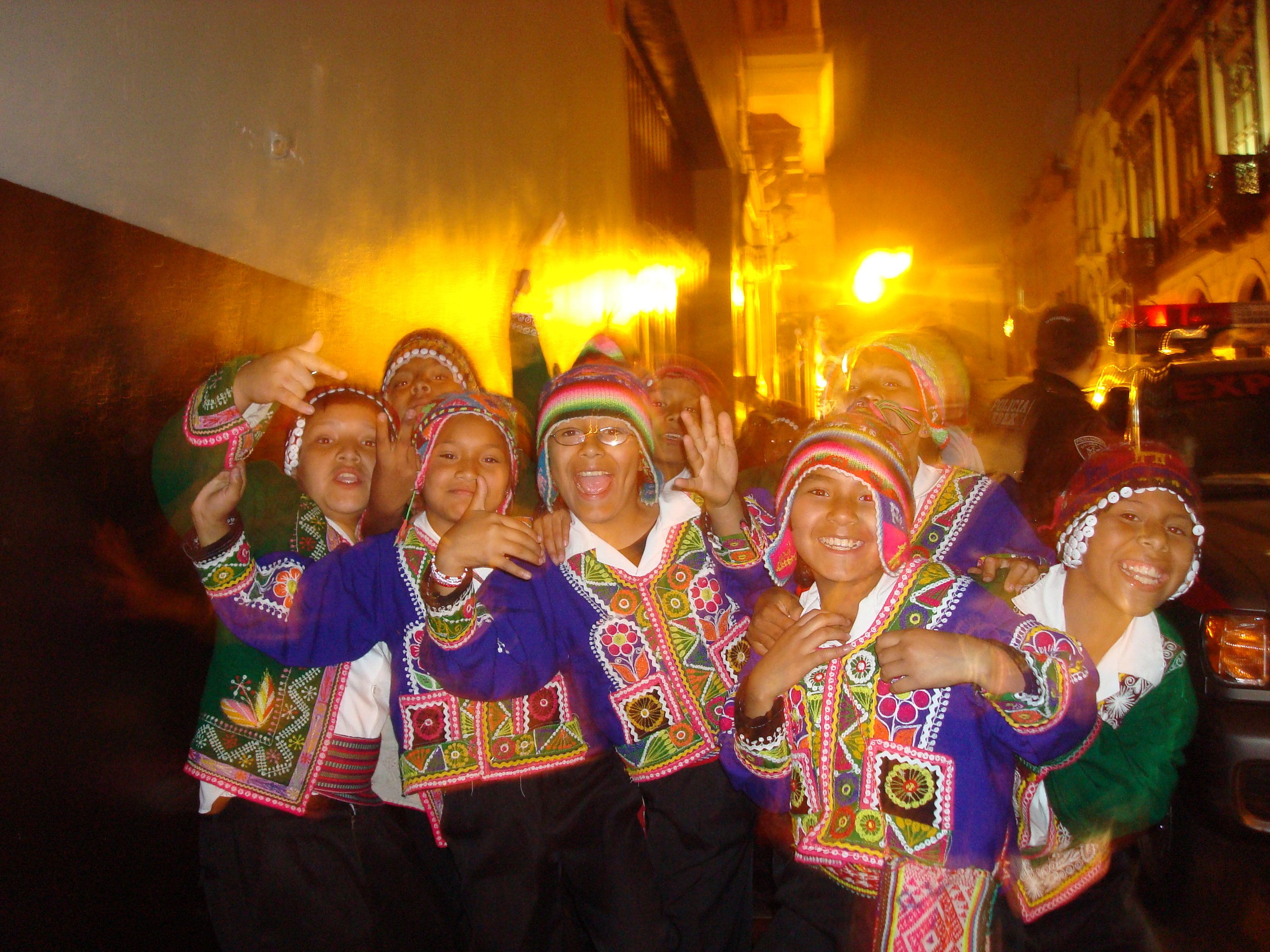 Niños de los Andes